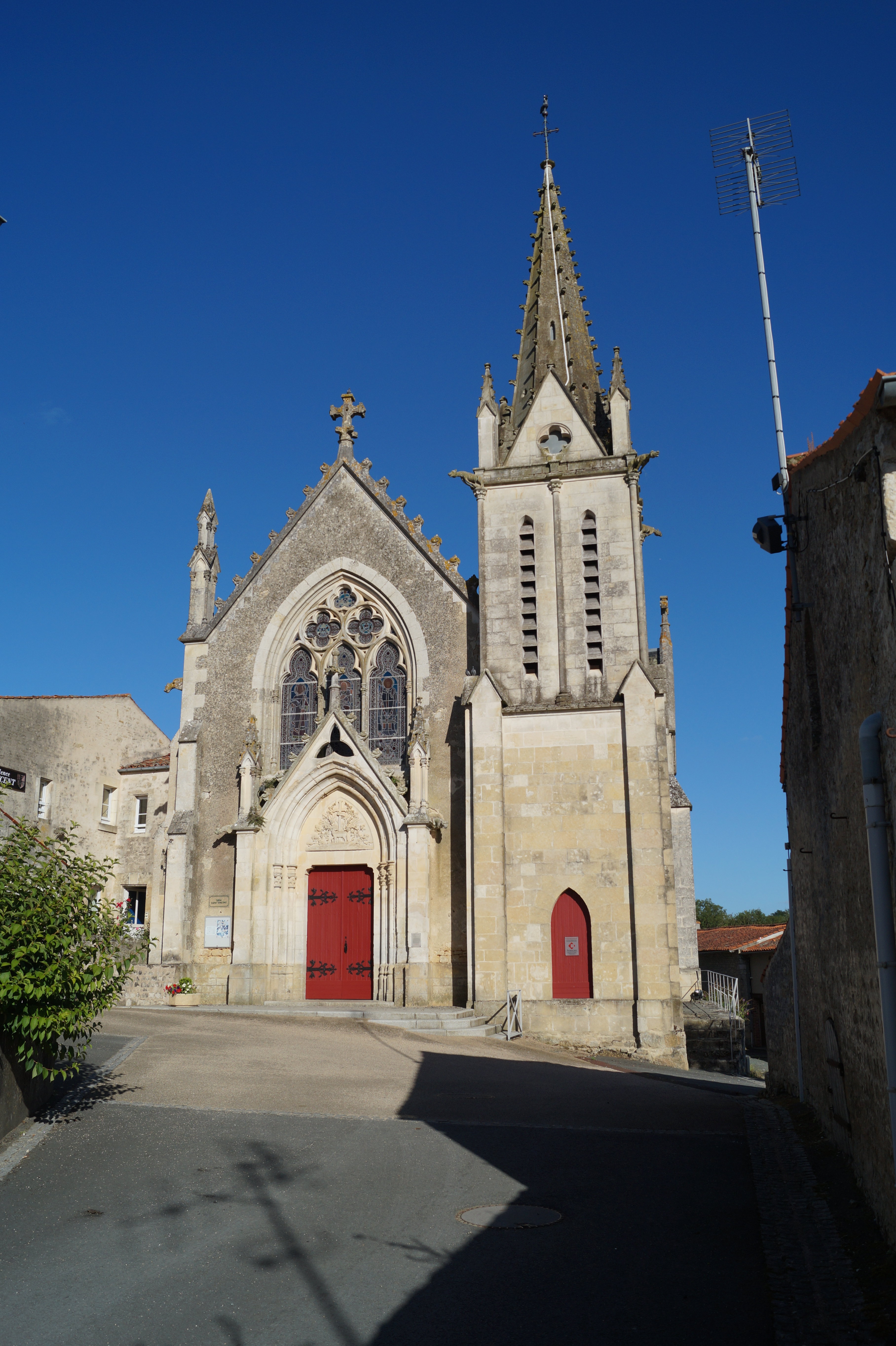 L’église Saint-Vincent de L’Orbrie.